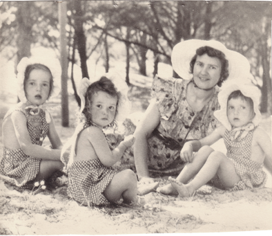 Denise et ses trois filles en vacances à l’île de Ré en 1943